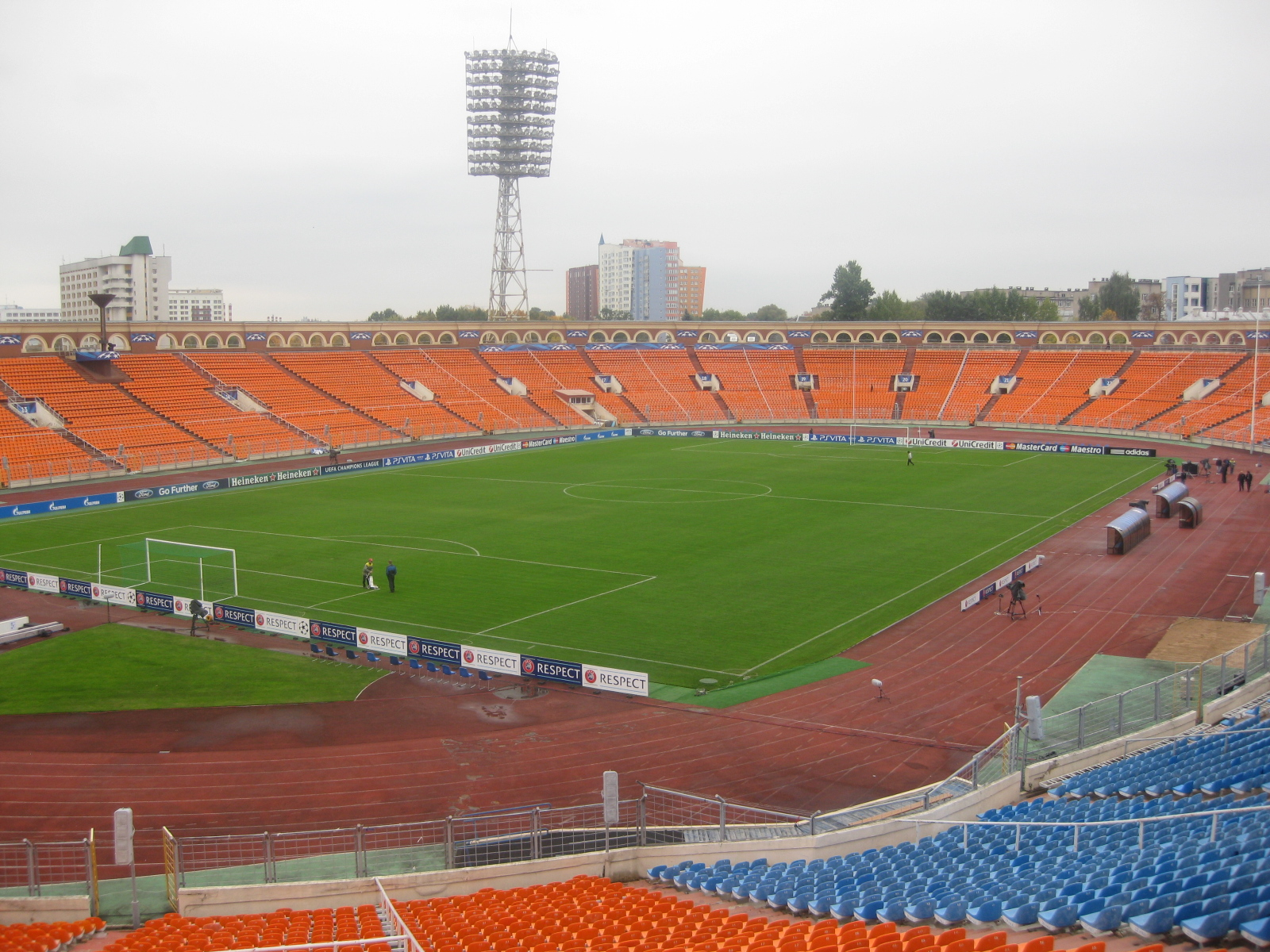 Стадион "Динамо" Минск. Вид на трибуны